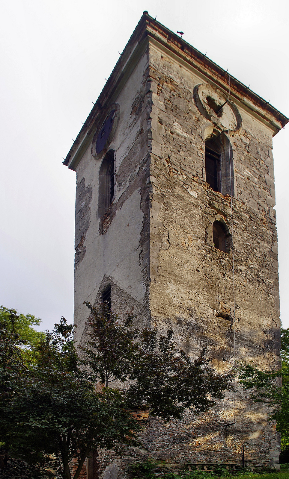 Harangtorony (Vál, Szent István tér 6.) This is a photo of a monument in Hungary. Identifier: 3950